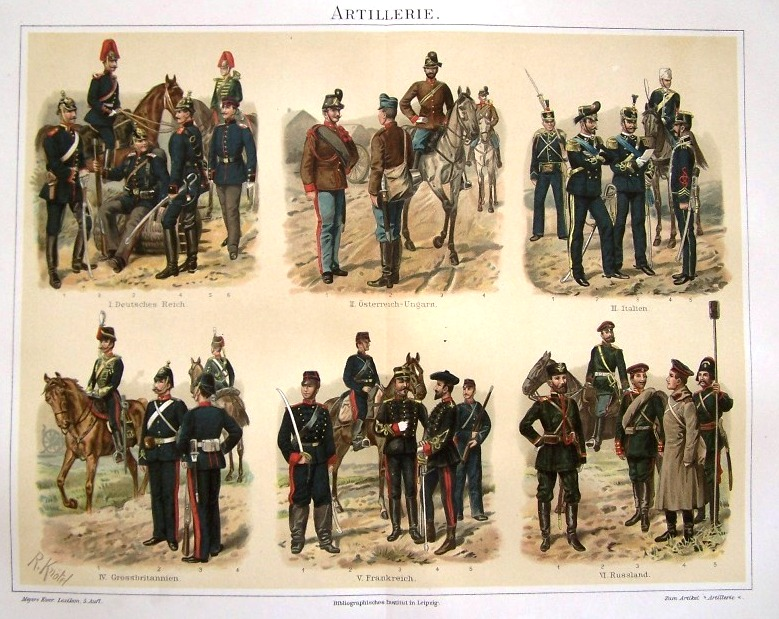 Обмундирование артиллеристов: 1.Германия 2.Австро-Венгрия 3.Италия 4.Великобритания 5.Франция 6.Россия